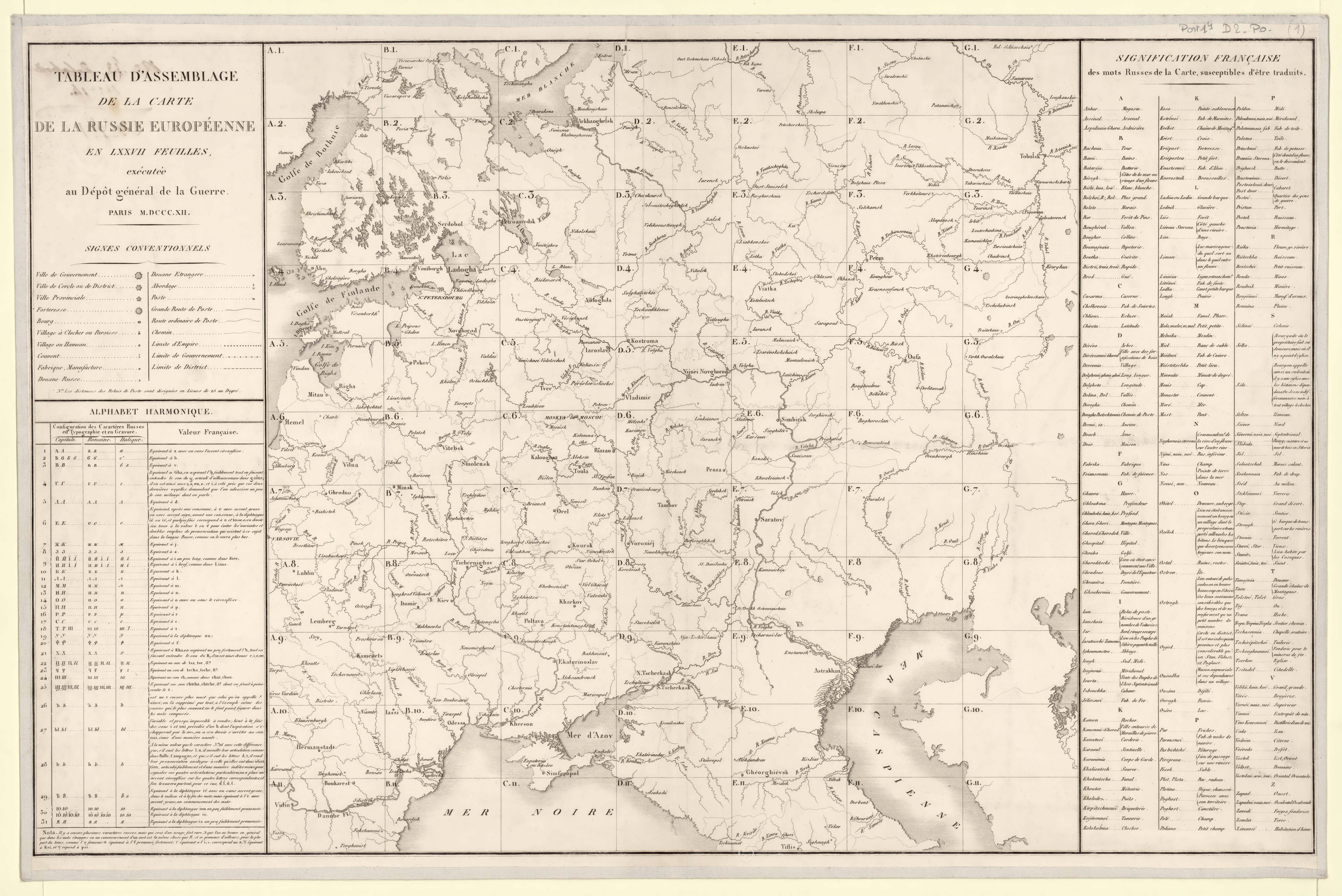 Сборный лист (схема расположения листов карты) перевода на французский язык российской Столистовой карты. Перевод был сделан во Франции по заказу французского Генштаба накануне войны 1812 года.